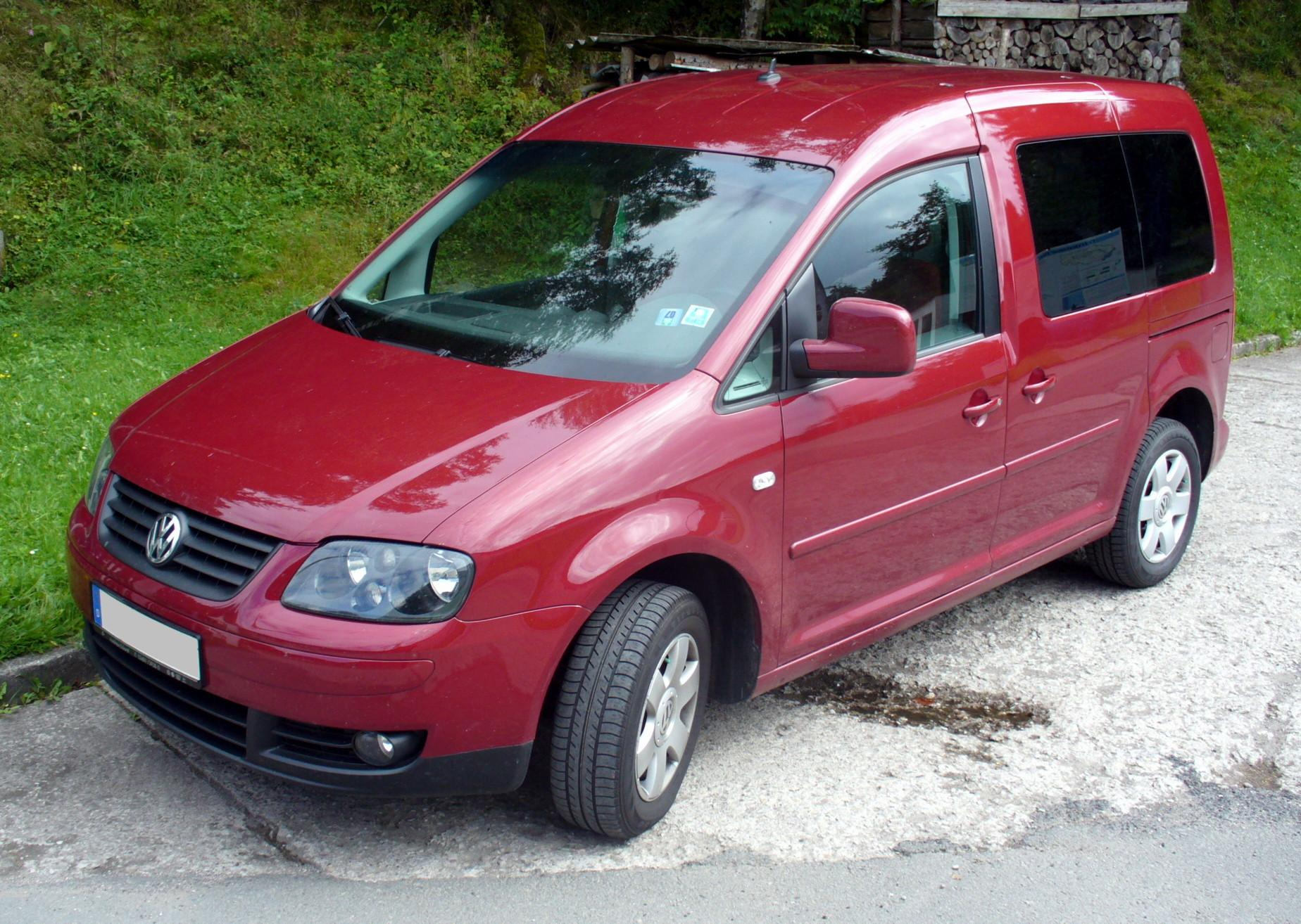 VW Caddy